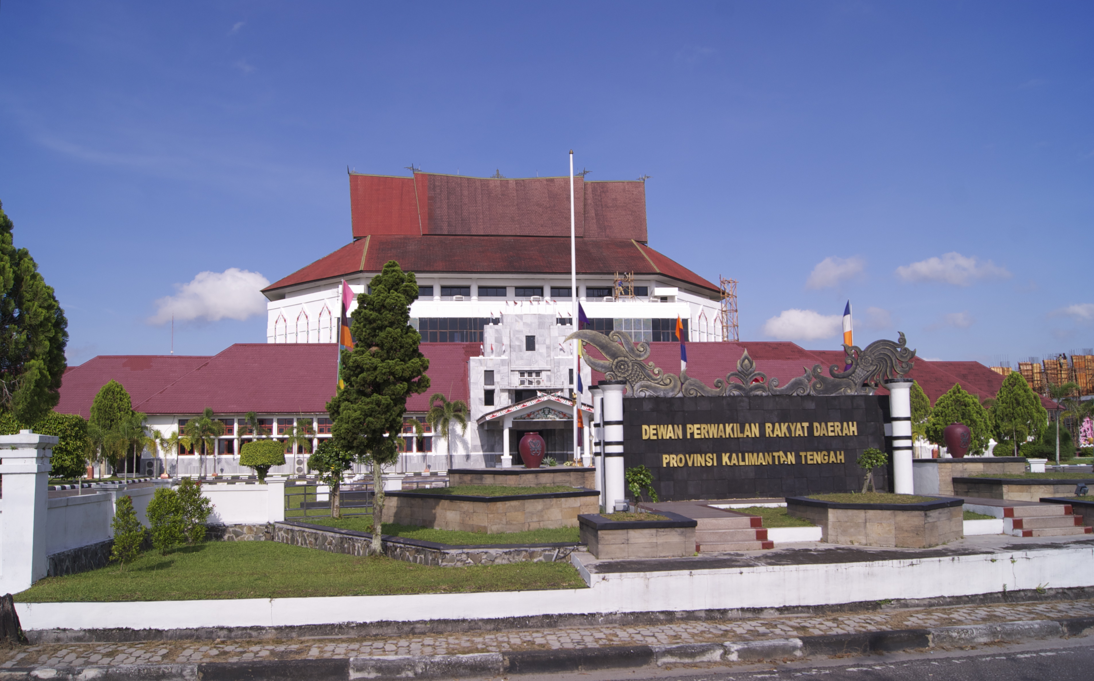 Gedung DPRD Kalimantan Tengah